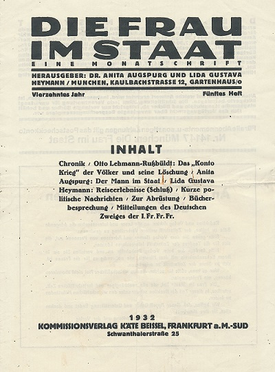 Periodico "Die Frau im Staat"